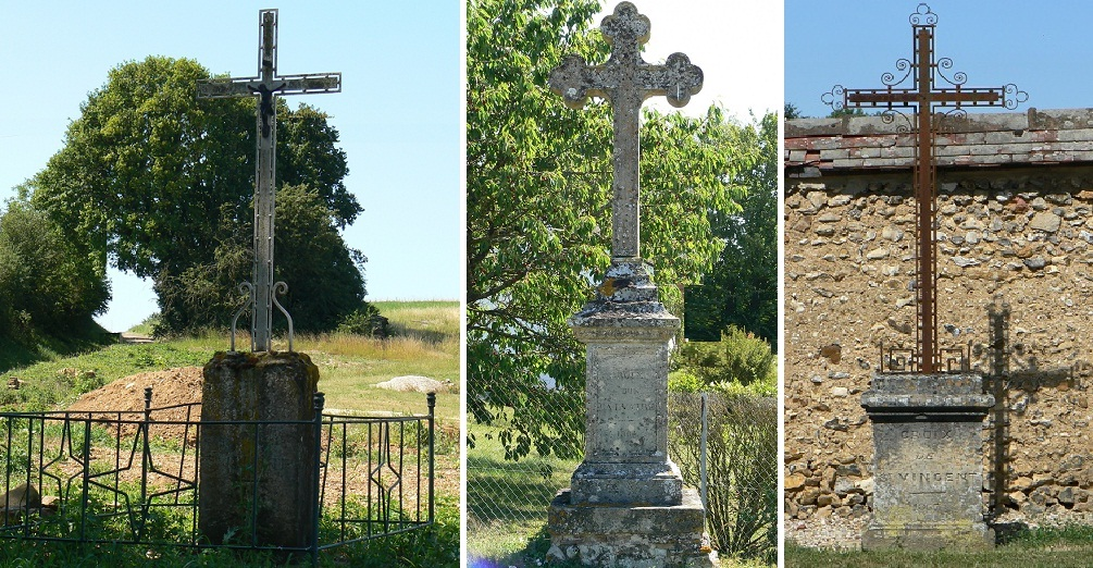 trois croix des Sièges 89